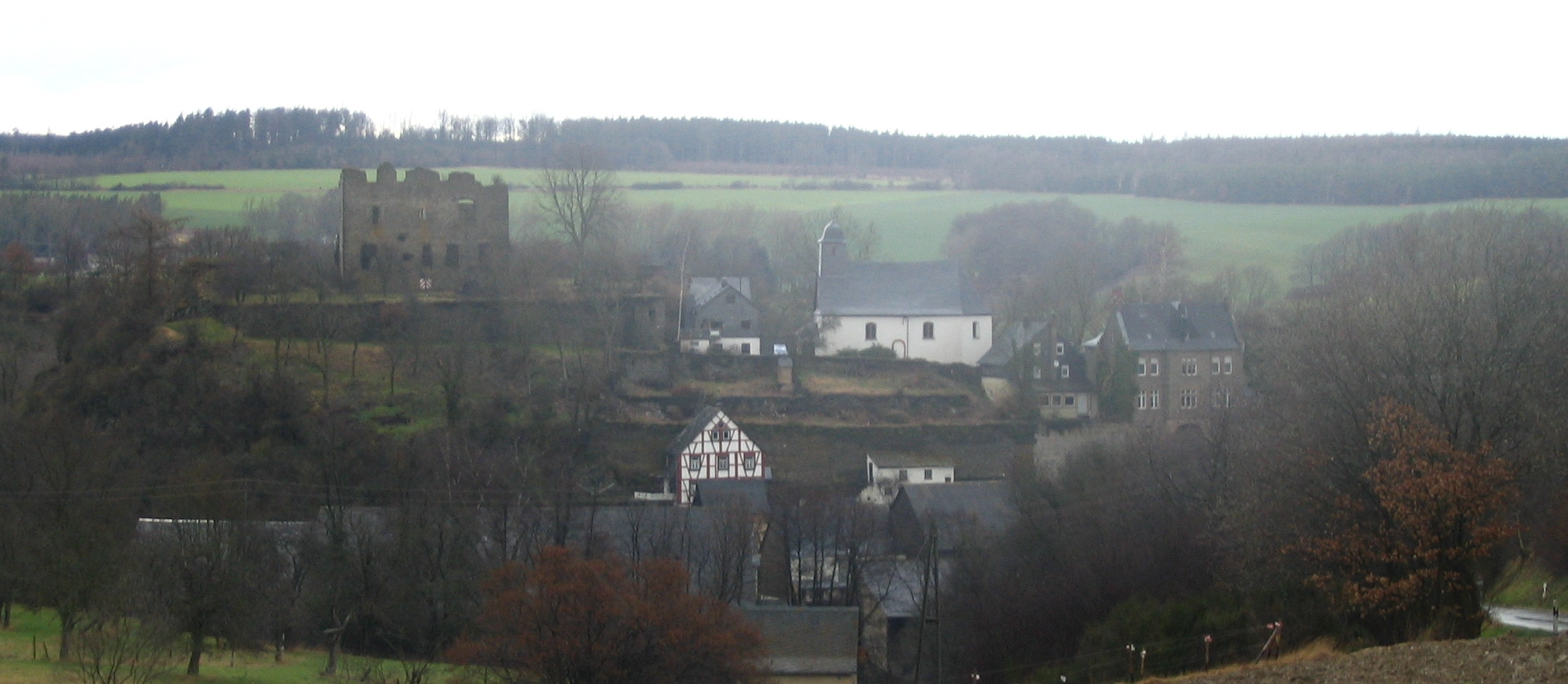 Dill im Hunsrück